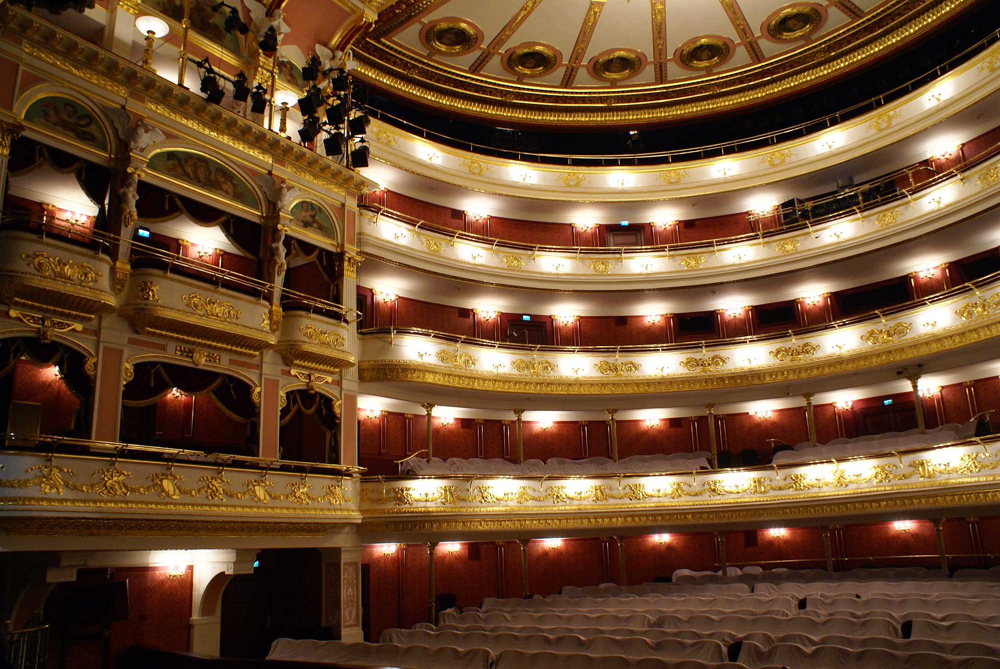 Wrocław, opera, 1837, 1871, 1955